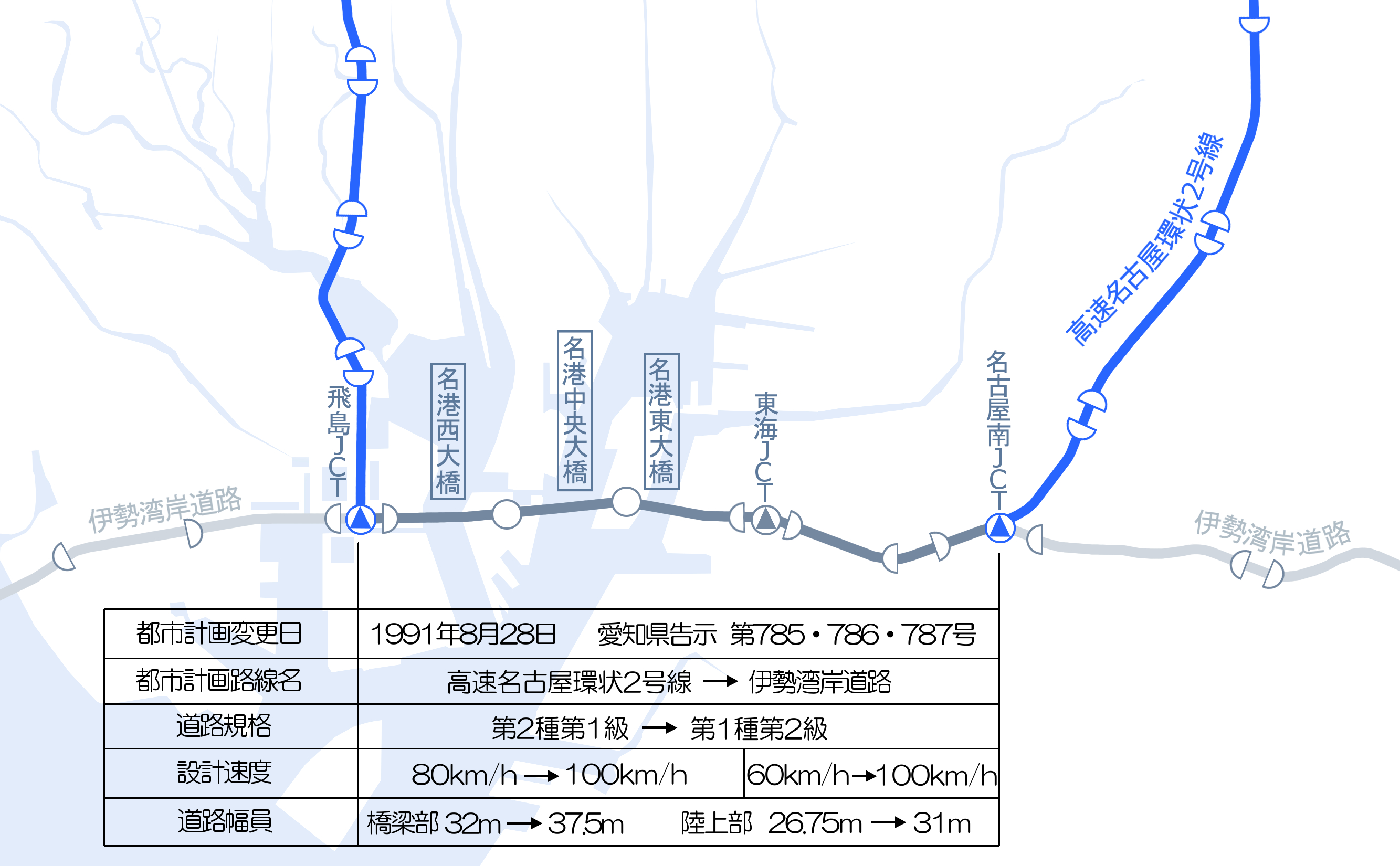 名古屋環状2号線 名古屋南JCT-飛島JCT間の都市計画変更図。図典拠：『中日新聞』1991年4月27日朝刊、18頁・『名古屋都市計画史Ⅱ（昭和45年～平成12年度）上巻』381、385、386、411-412頁。